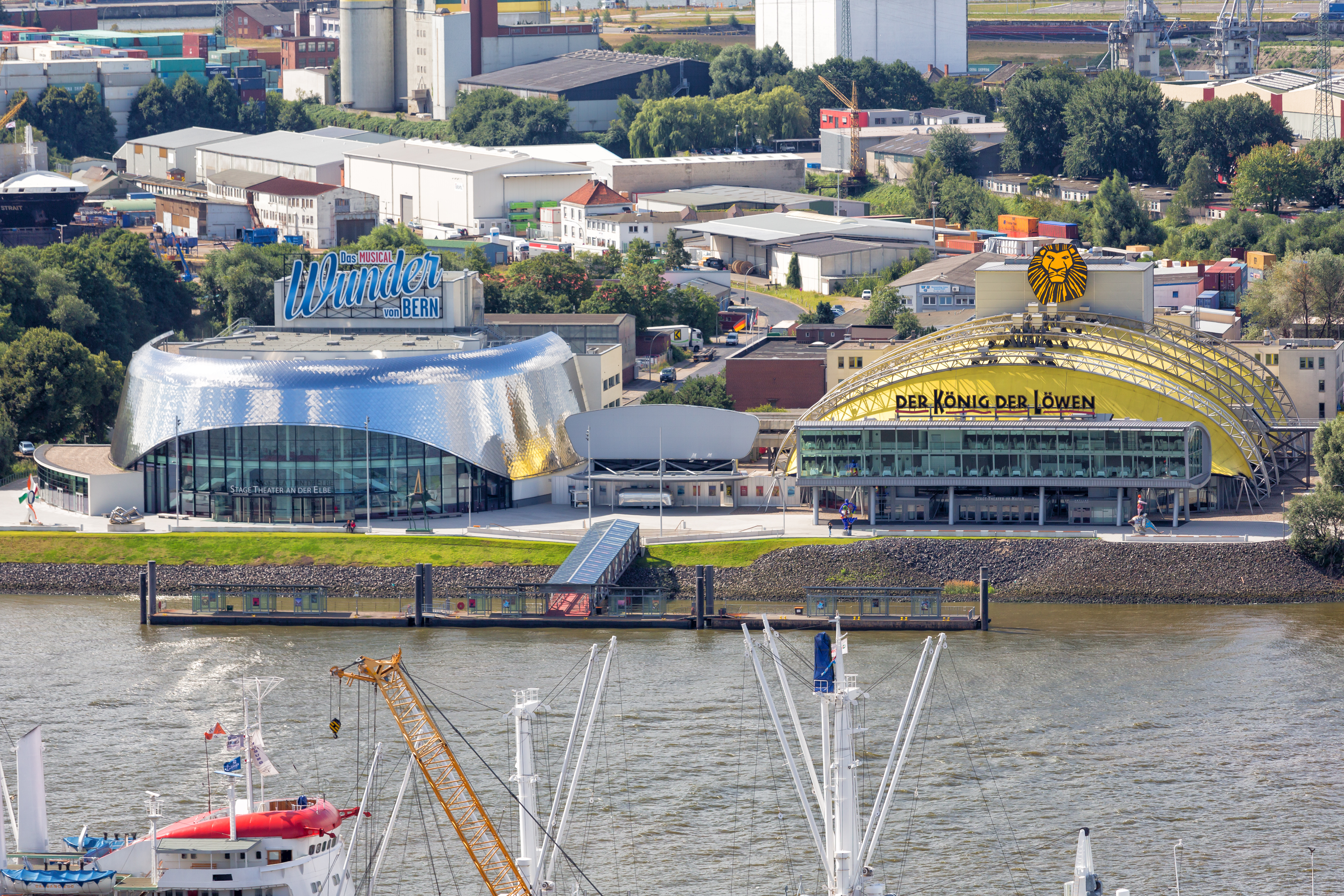 Hamburg - Wunder von Bern - König der Löwen - 2016